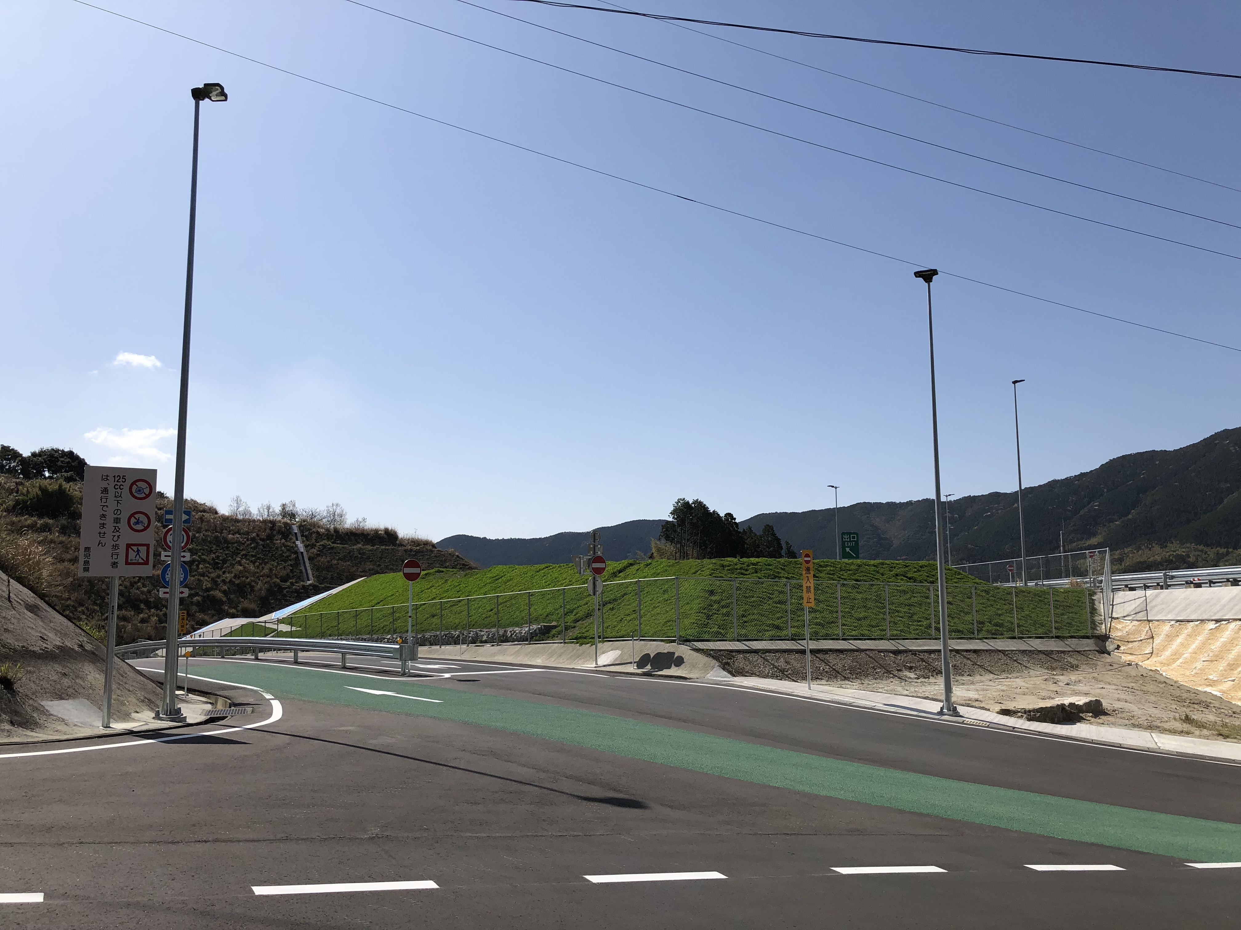 北薩横断道路きららインターチェンジの出入口